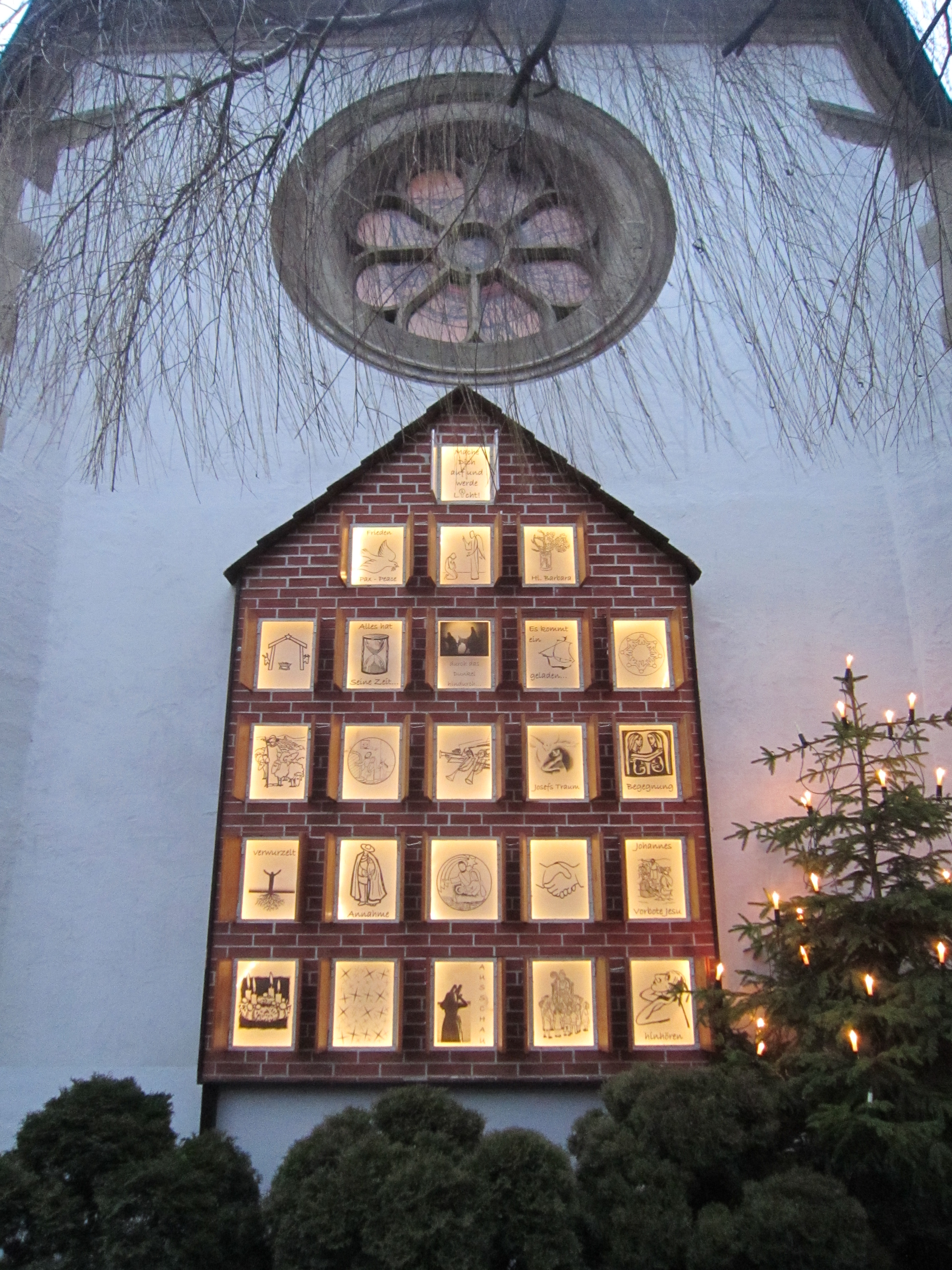 Adventskalender an der östlichen Außenwand der Pfarrkirche St. Petronilla in Münster-Handorf